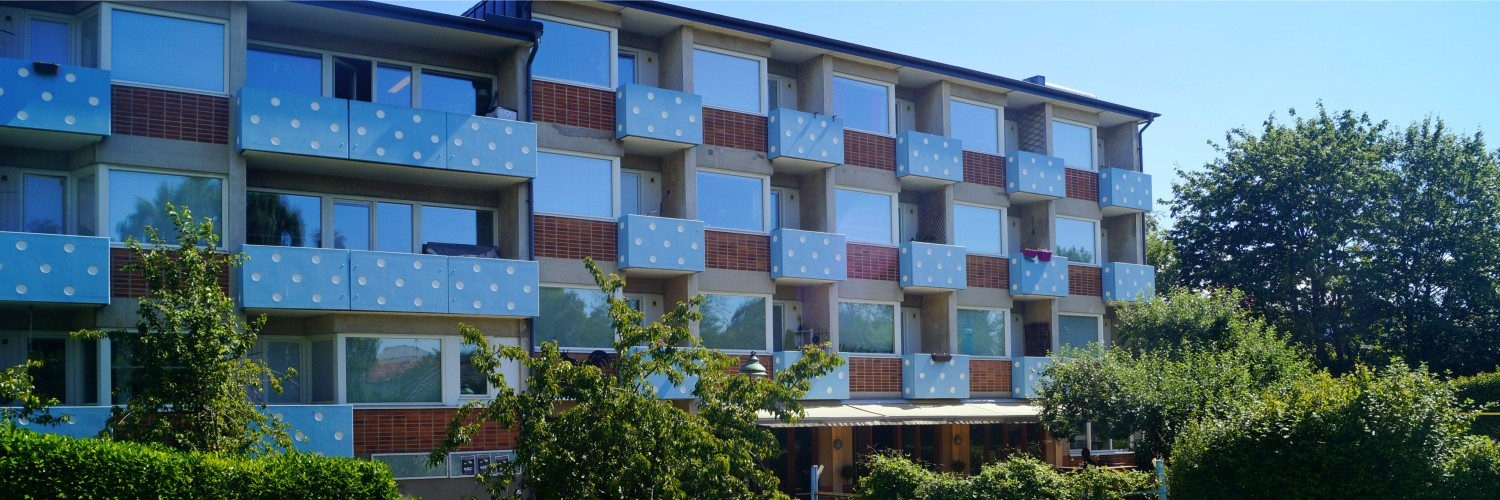 Fasaden på Kristianstads nation i Lund